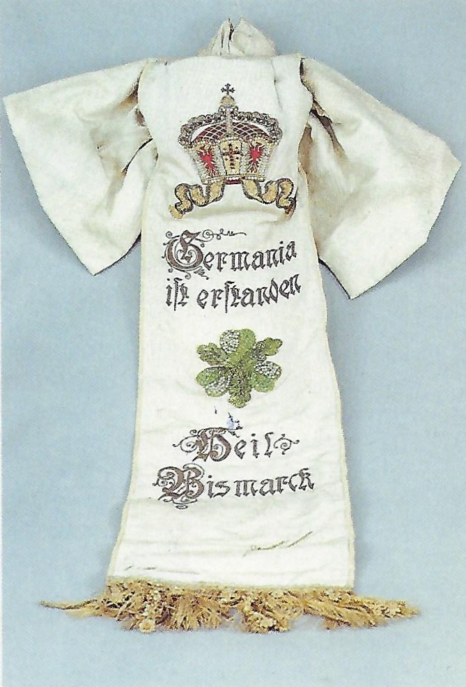 Vivatschleife für Otto von Bismarck